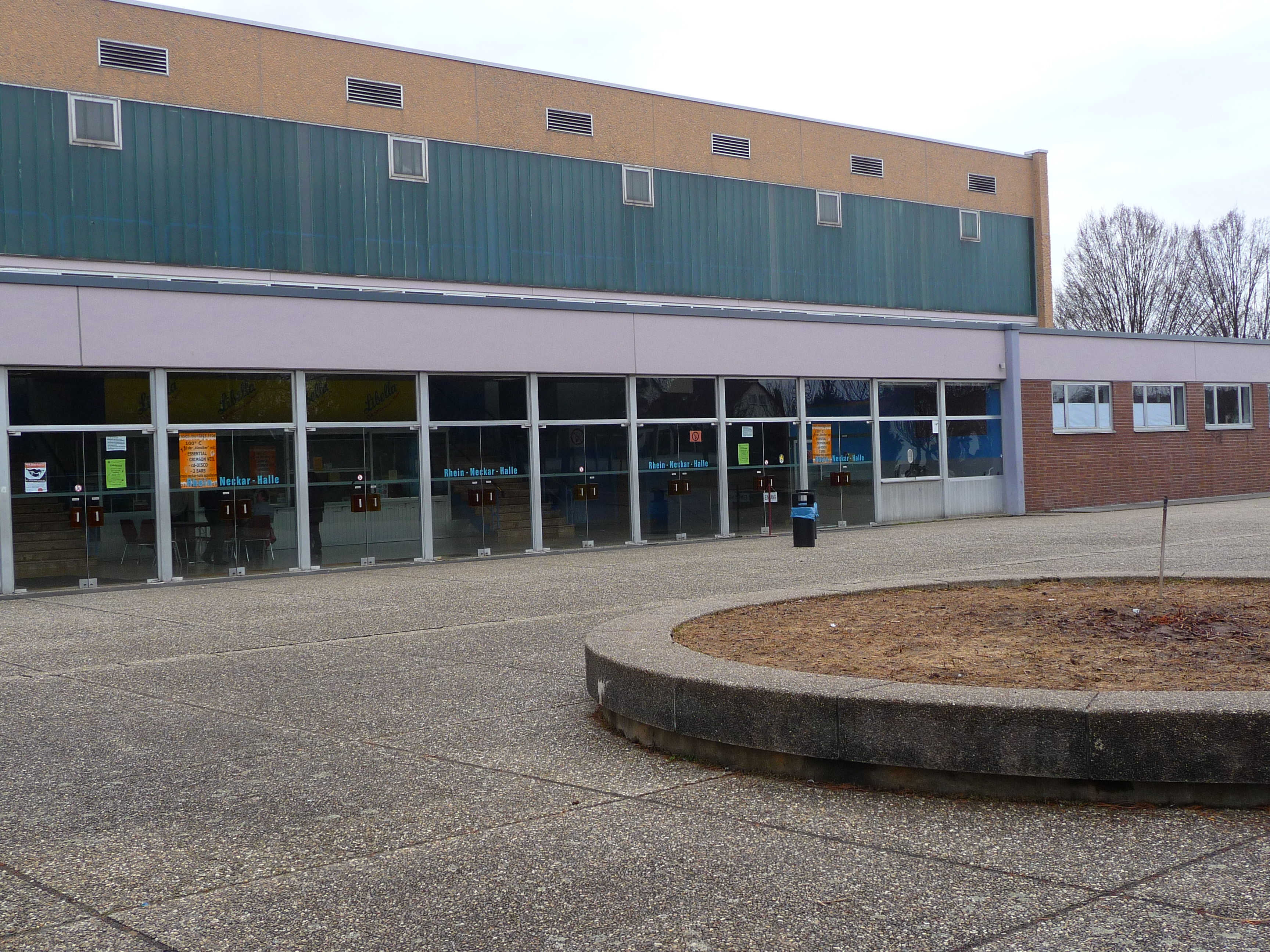 Rhein-Neckar-Halle in Eppelheim (Rhein-Neckar-Kreis), erbaut 1970 als Großsporthalle (aufteilbar in 3 Hallen), mit zusätzlich 4 Kegelbahnen und einem Body-Building-Raum im Untergeschoß und Räumen für eine Gaststätte